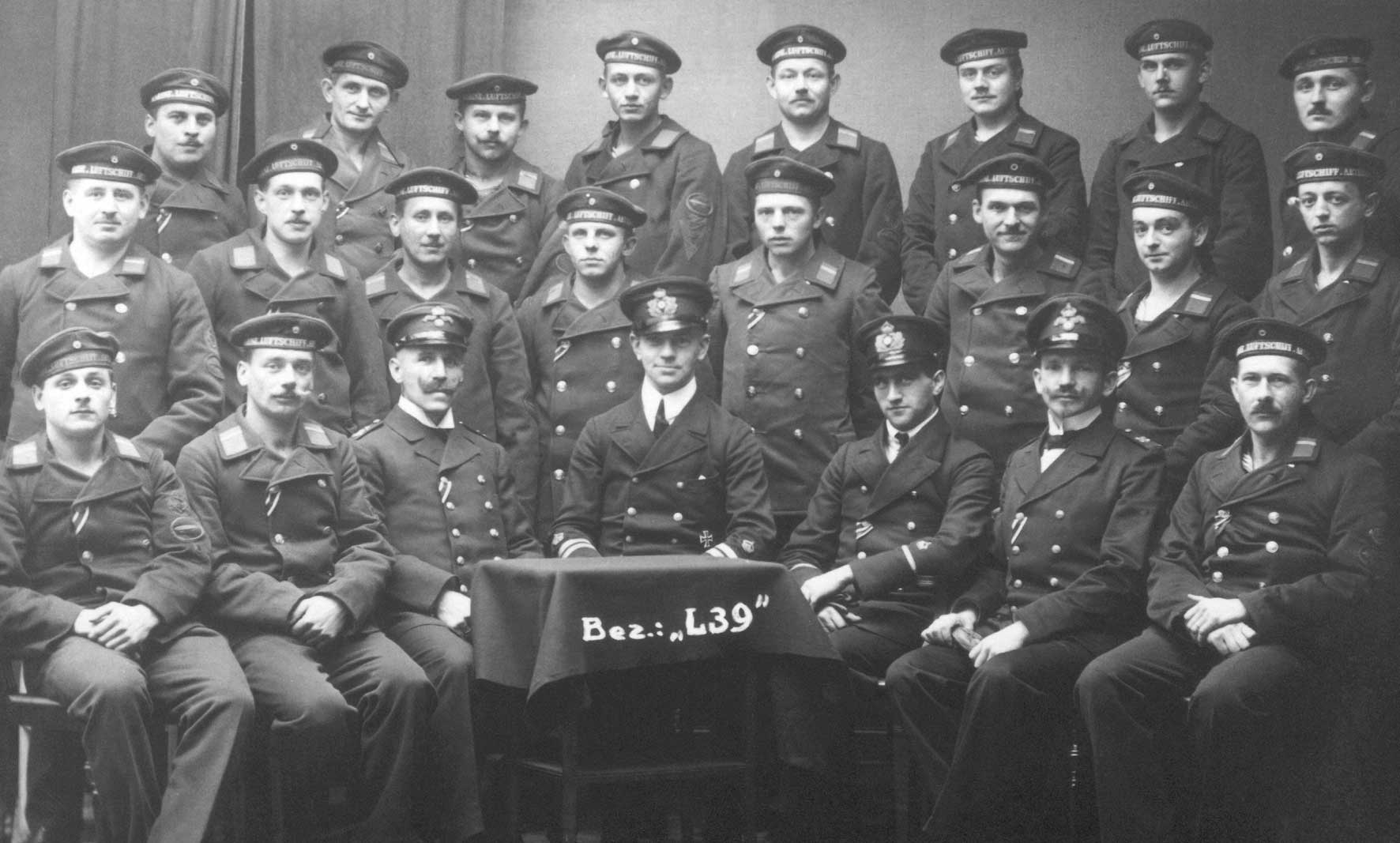 L 39's besætning med Robert Koch i midten